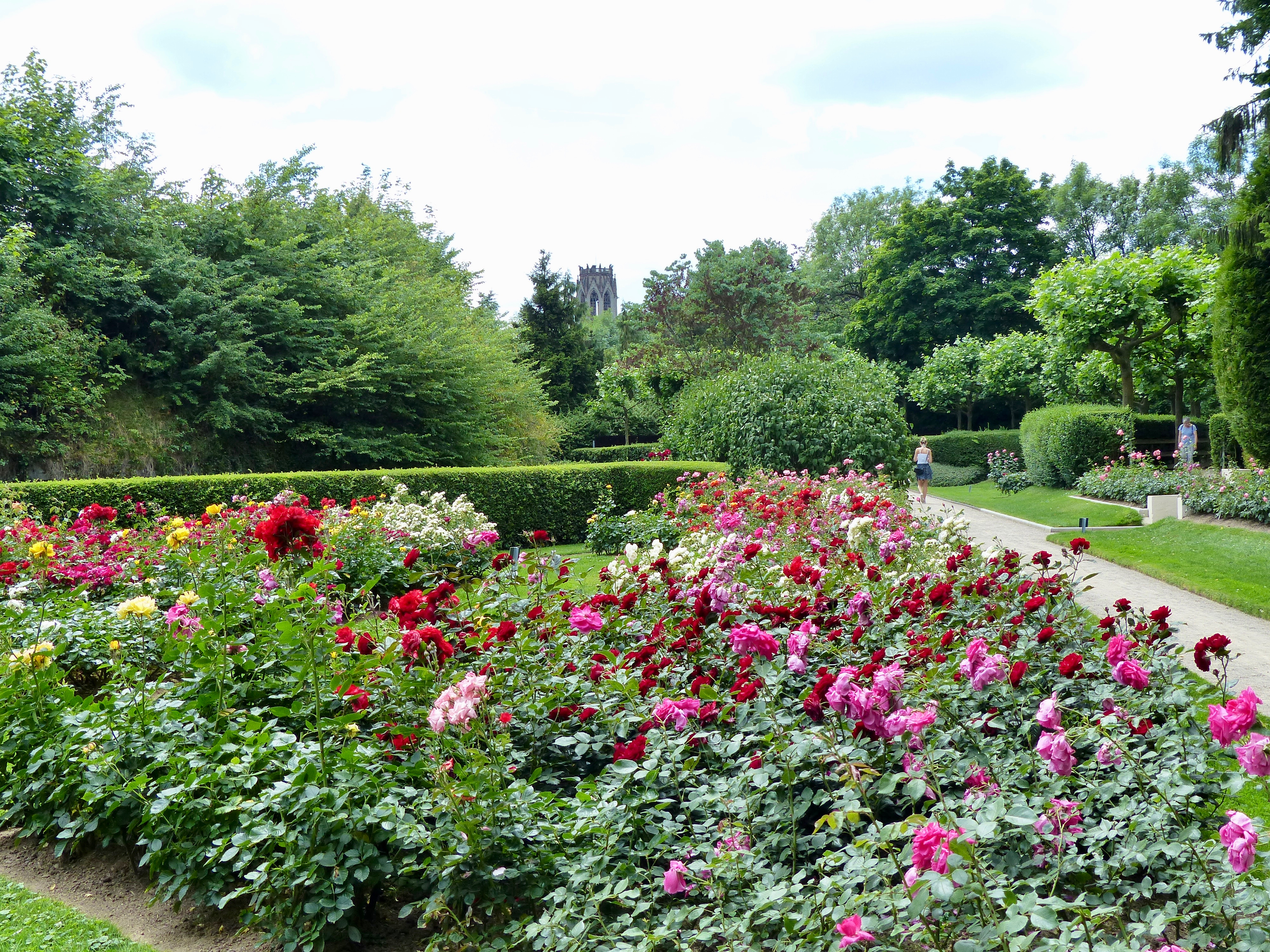 Rosengarten der Stadt Köln, Juni 2017